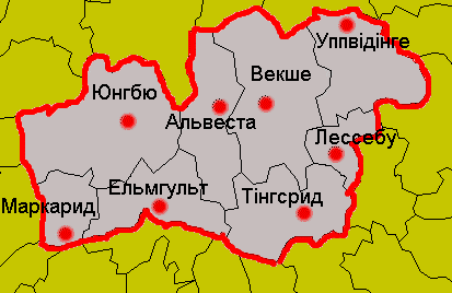 Карта адміністративного поділу лену Крунуберг у Швеції. Карту створено на основі карти File:Kronoberg Municipalities.png.